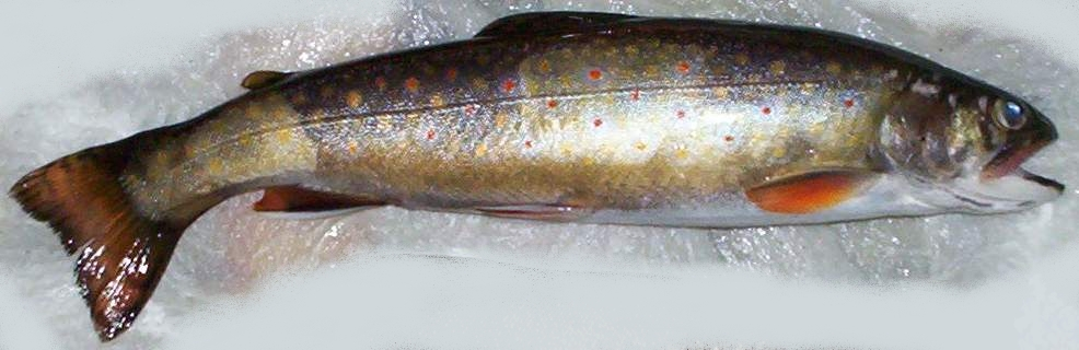 Image d'une omble de fontaine (truite mouchetée).